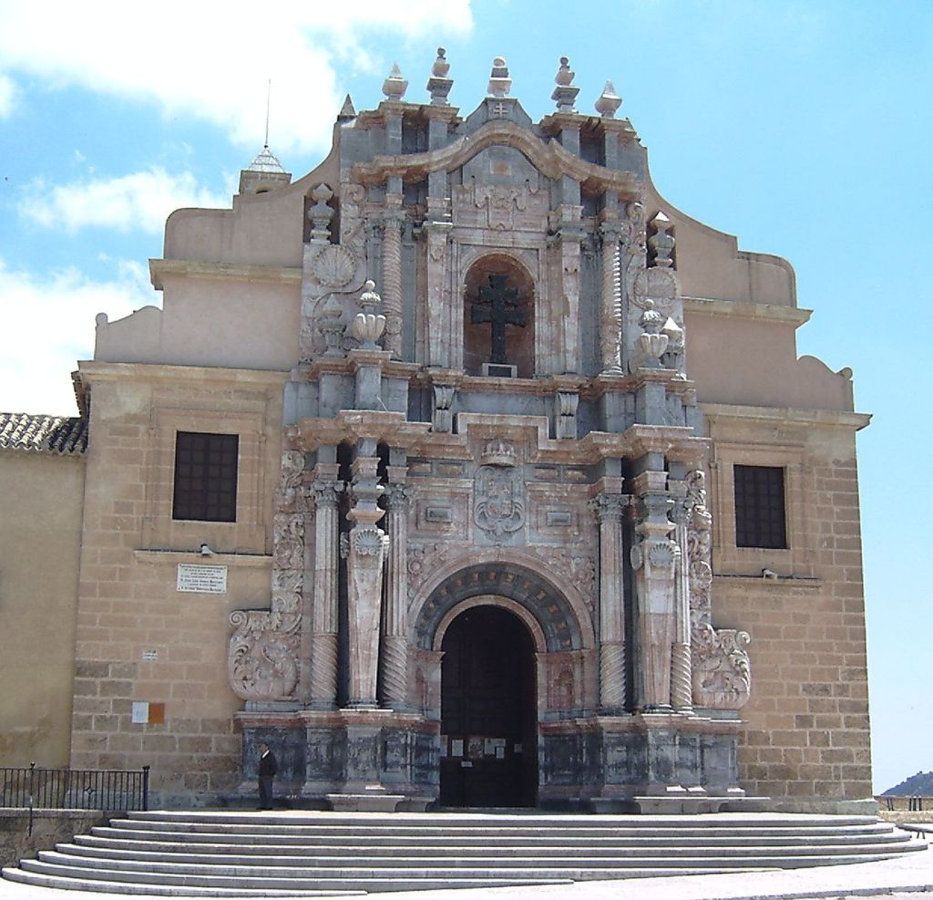 Caravaca de la Cruz, Murcia, España. -- Fachada barroca del castillo-santuario de la Vera Cruz. -- Baroque façade of the Vera Cruz sanctuary.